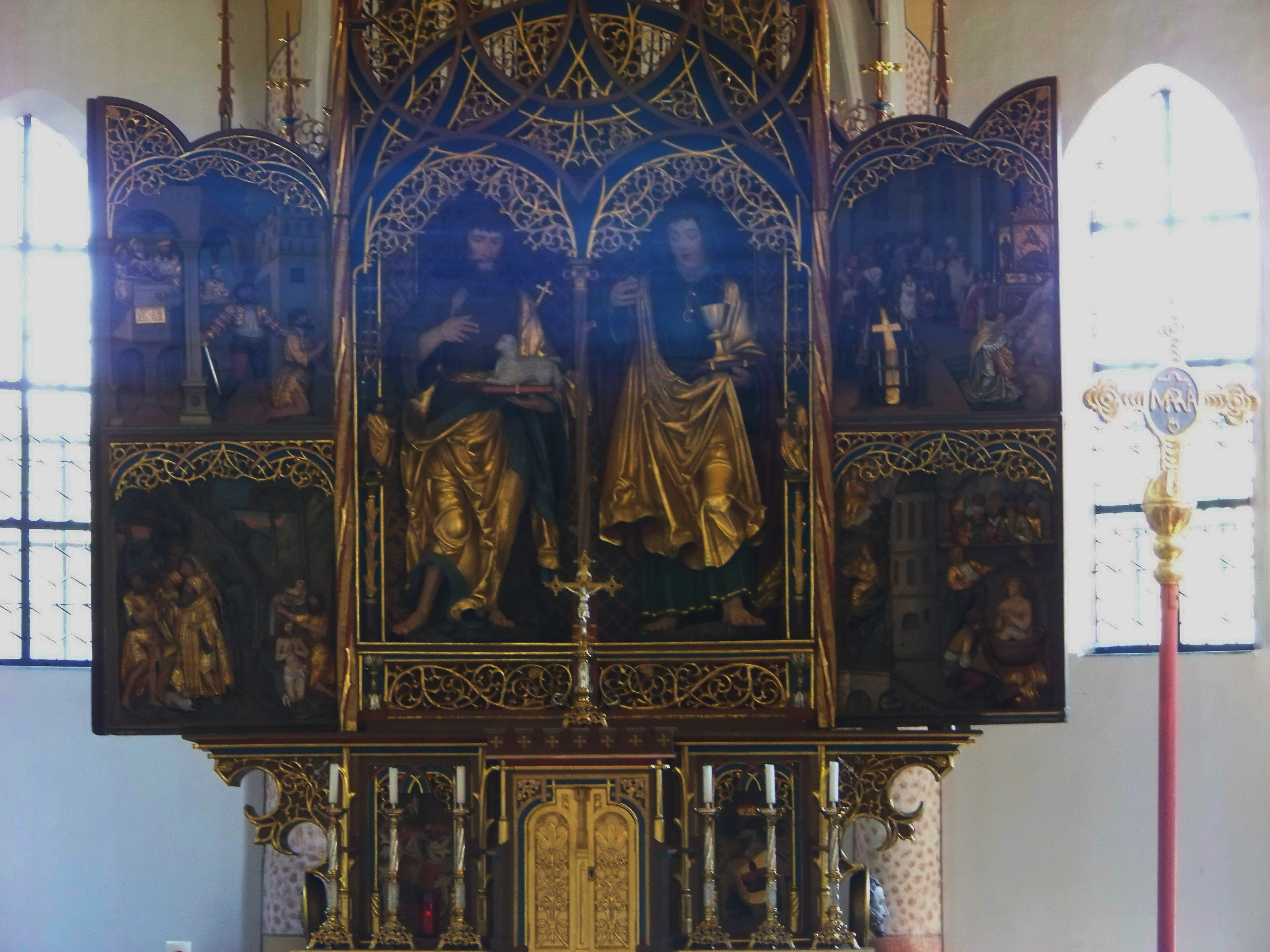 Stadt Landau a. Isar; Niederbayern.Usterling, Mamminger Straße 62. Katholische Filialkirche St. Johannes der Täufer. Gestaffelter Bau in Blankziegelmauerwerk und Sattelturm, spätgotisch, Anfang 16. Jahrhundert. Hochaltar aus der Übergangszeit von der Spätgotik zur Frührenaissance gegen 1520.